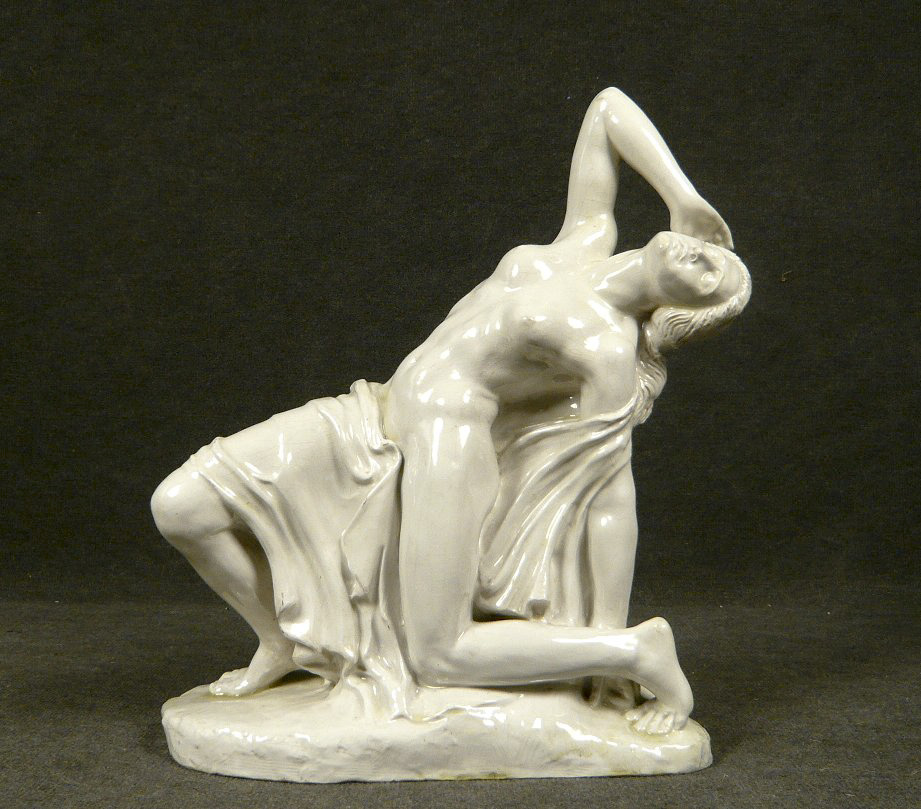 Stervende Amazone, terracotta, 1918